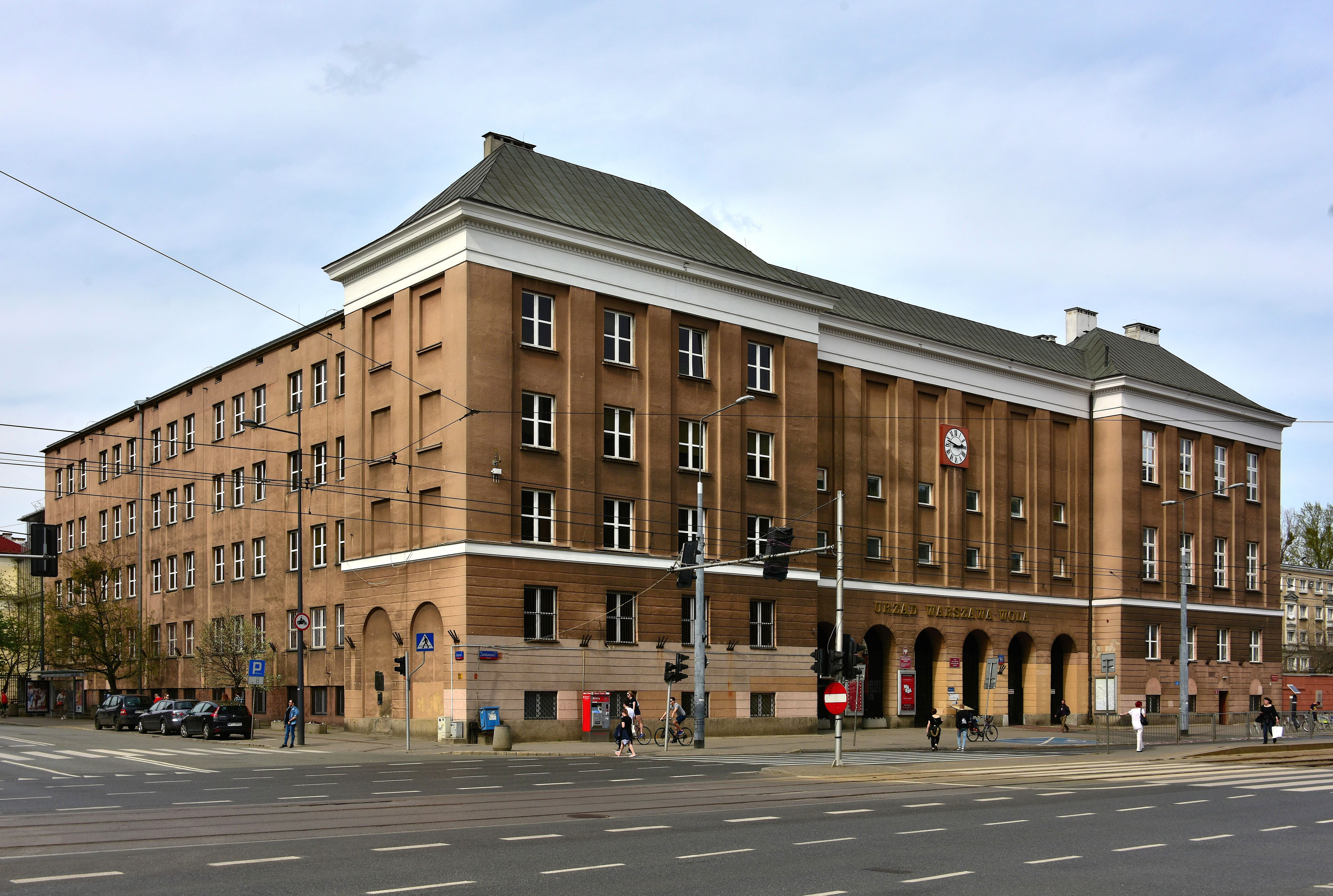 Urząd Dzielnicy Warszawa-Wola przy al. "Solidarności" 90 w Warszawie